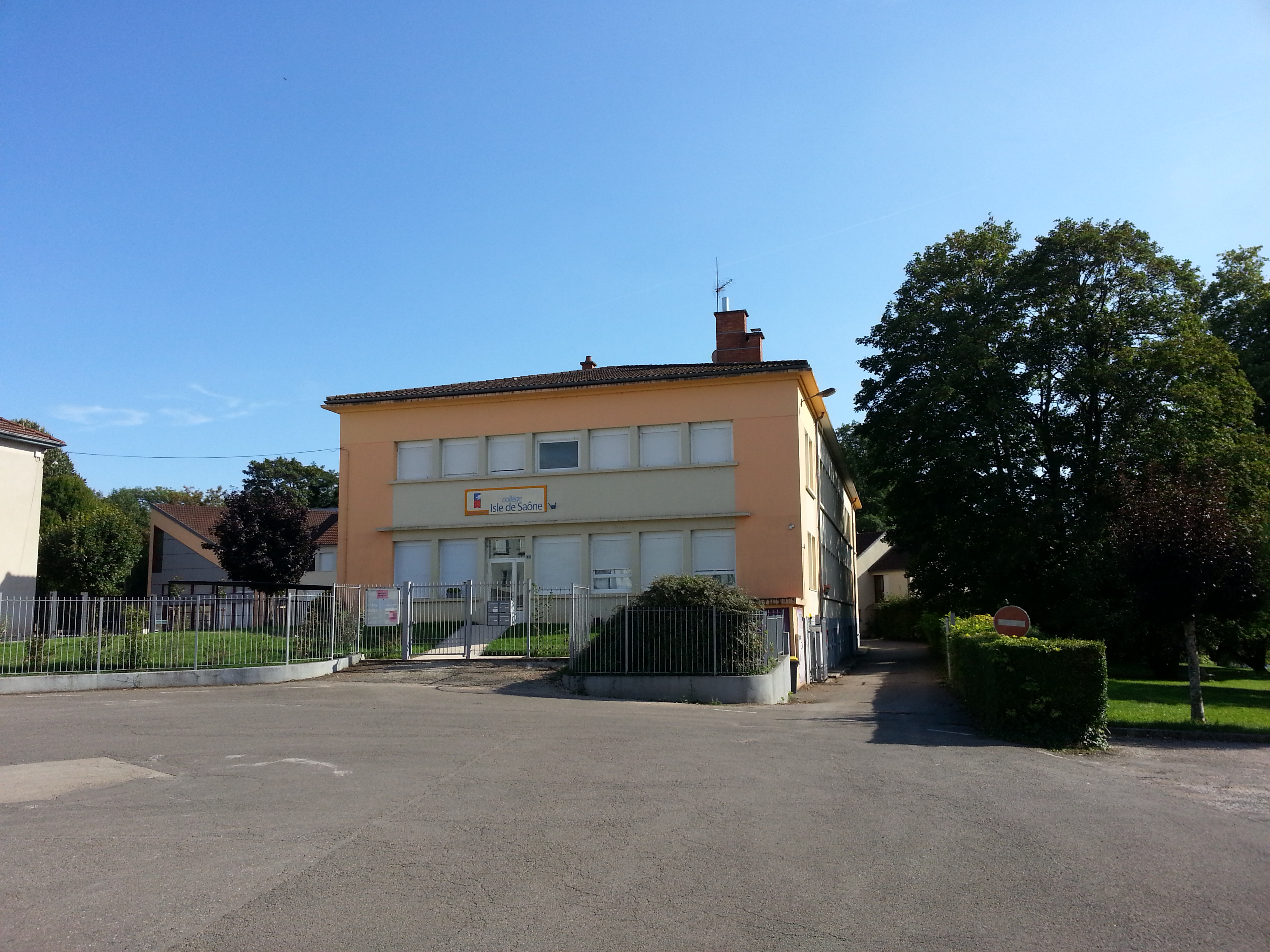 La Vieille Saône vue depuis le parc de Pontailler-sur-Saône